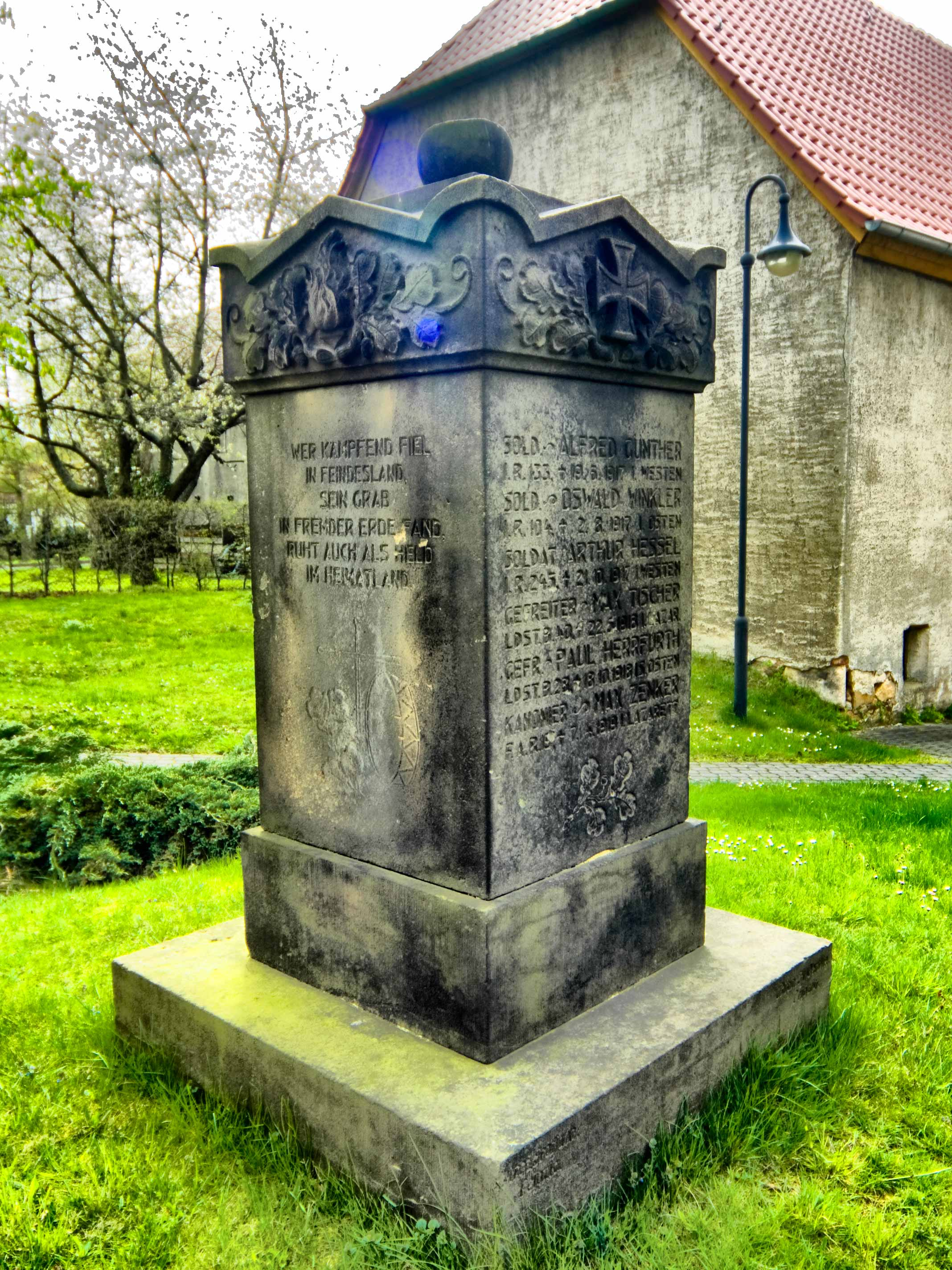 Denkmal der Opfer des Ersten Weltkrieges, Ortsteil Liptitz, Gemeinde Wermsdorf, Sachsen